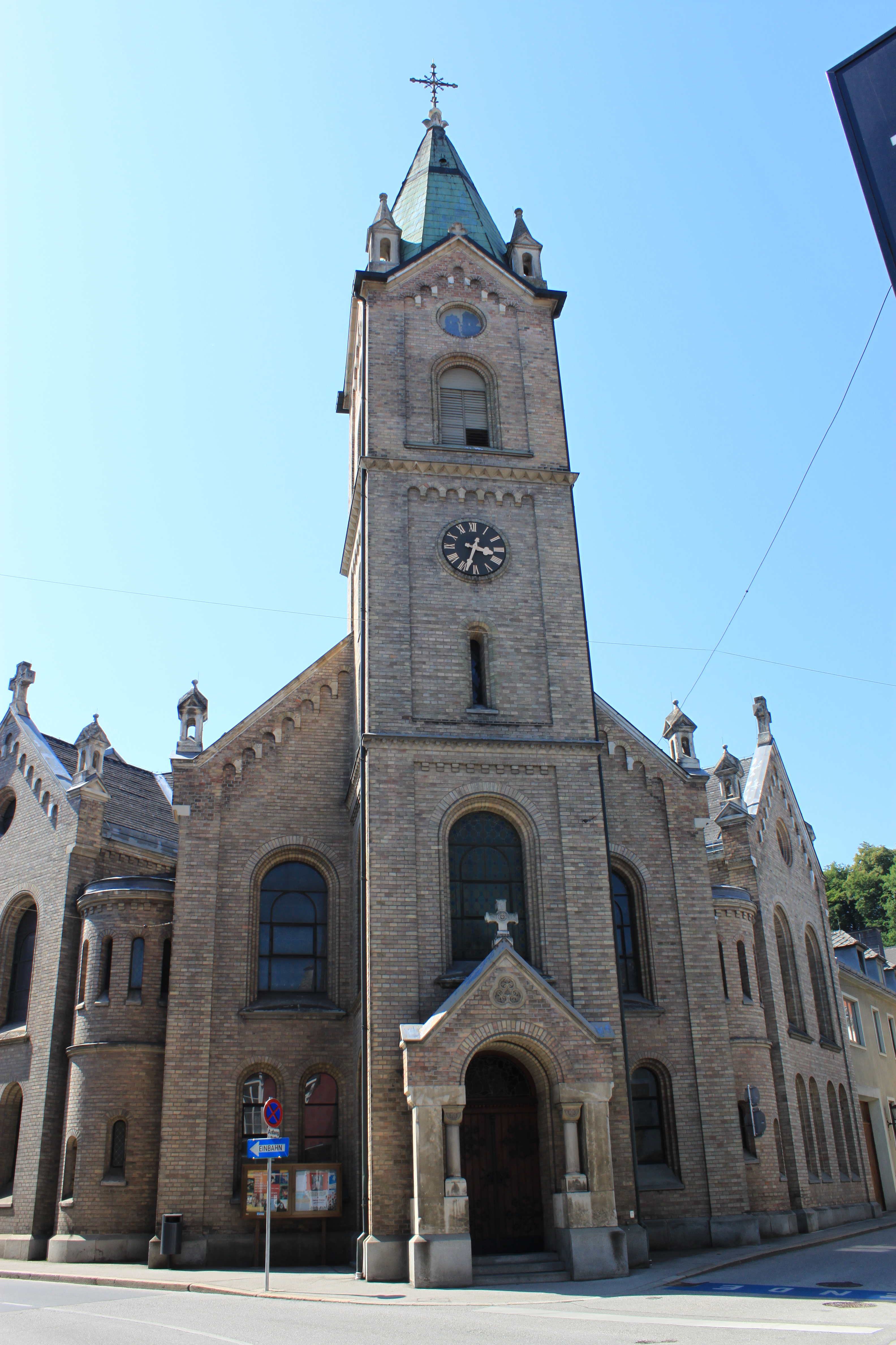 Klosterkirche der Schulschwestern zum Hl. Franz von Assisi, Klostergasse, 3300 Amstetten